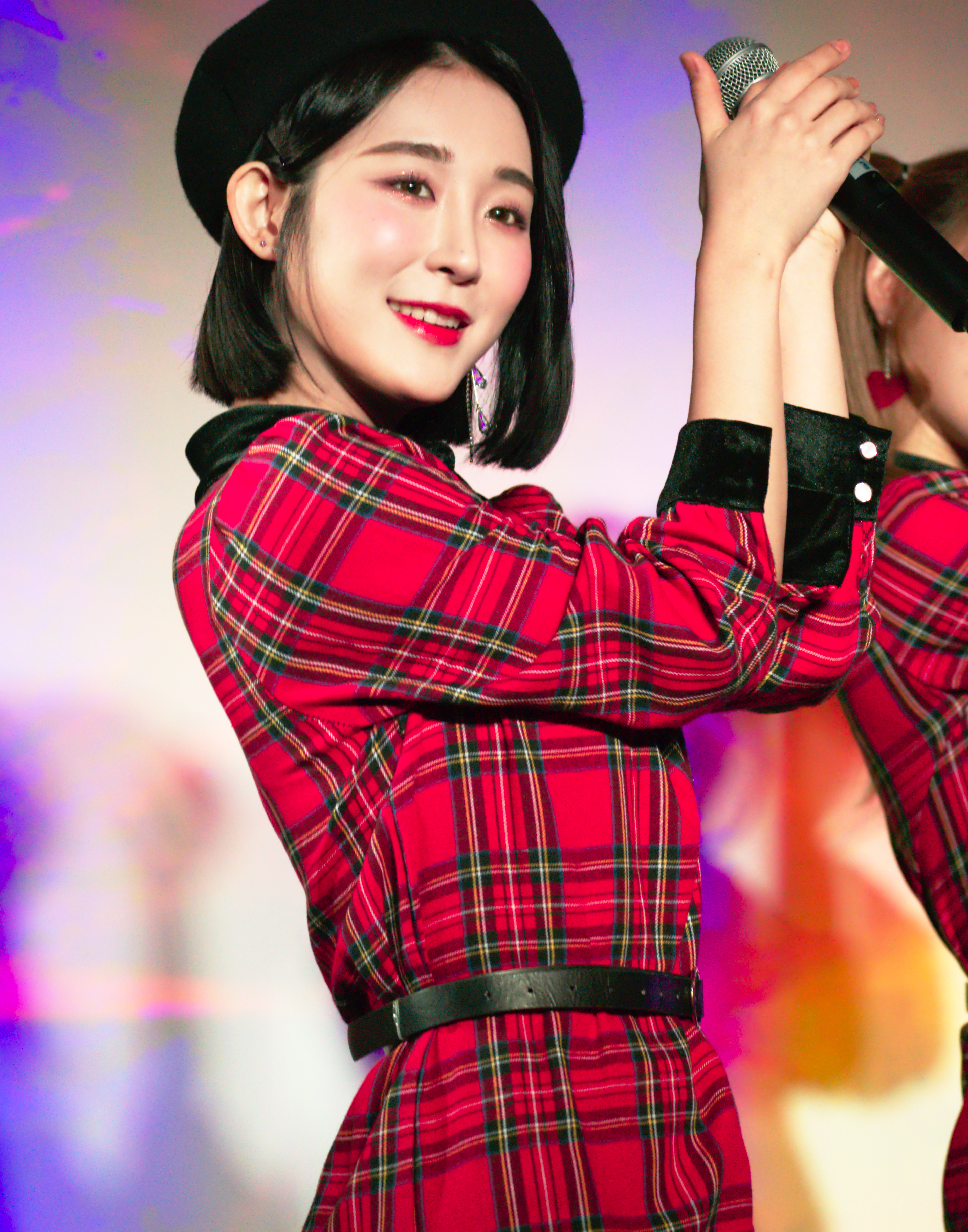 S.I.S CHRISTMAS CONCERT 20181225 2部 ダル